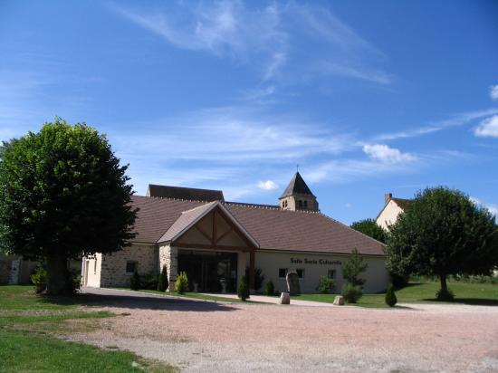 la salle socioculturelle à AVANT LES MARCILLY